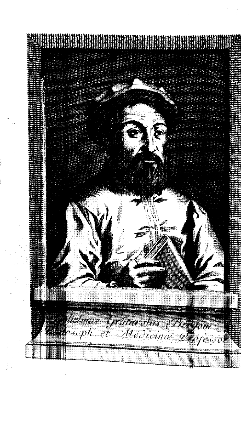 Della vita degli studi e degli scritti di Gulielmo Grataroli filosofo e medico. - In Bergamo : dalla Stamperia Locatelli, 1788. - 103, [1] p., [1] c. di tav. : ritratto ; 8º .